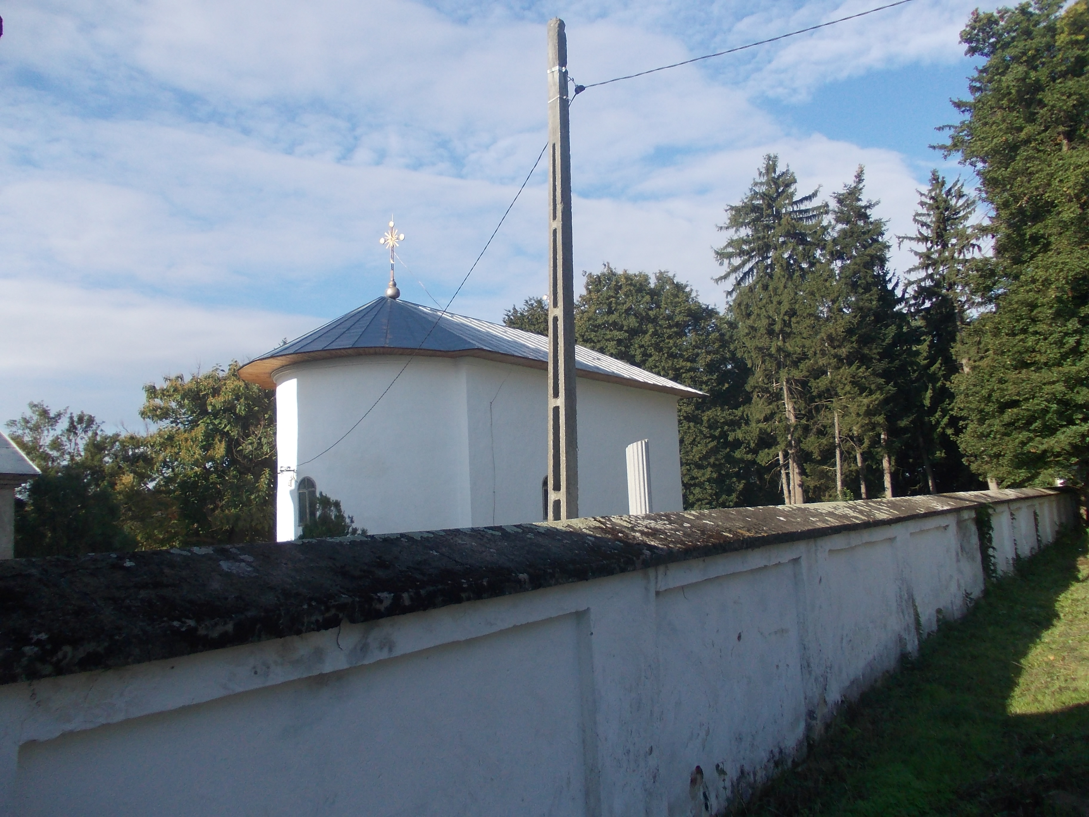 Biserica "Sf. Patruzeci de Mucenici" 01